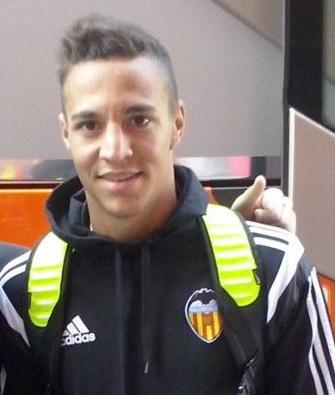 El jugador merengot abans de jugar el derbi contra el Llevant